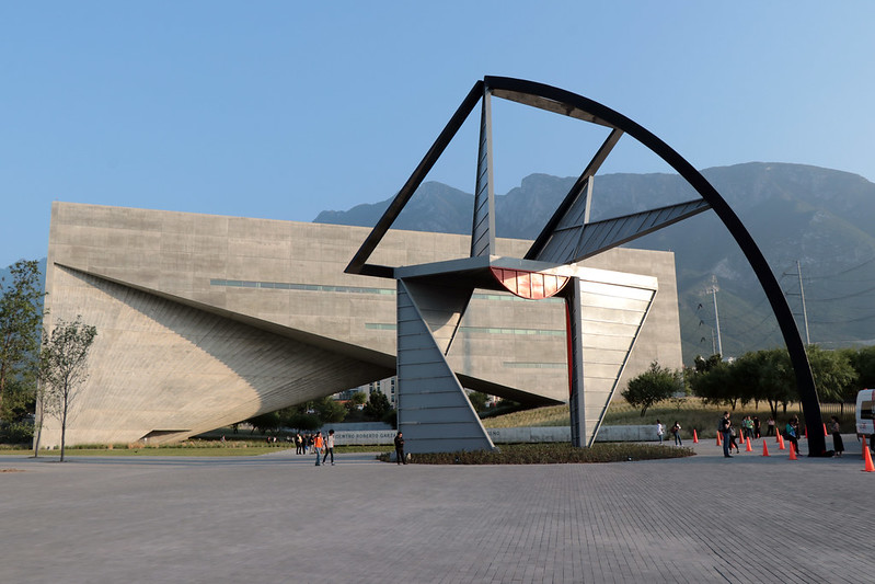 Teorema Luna UDEM